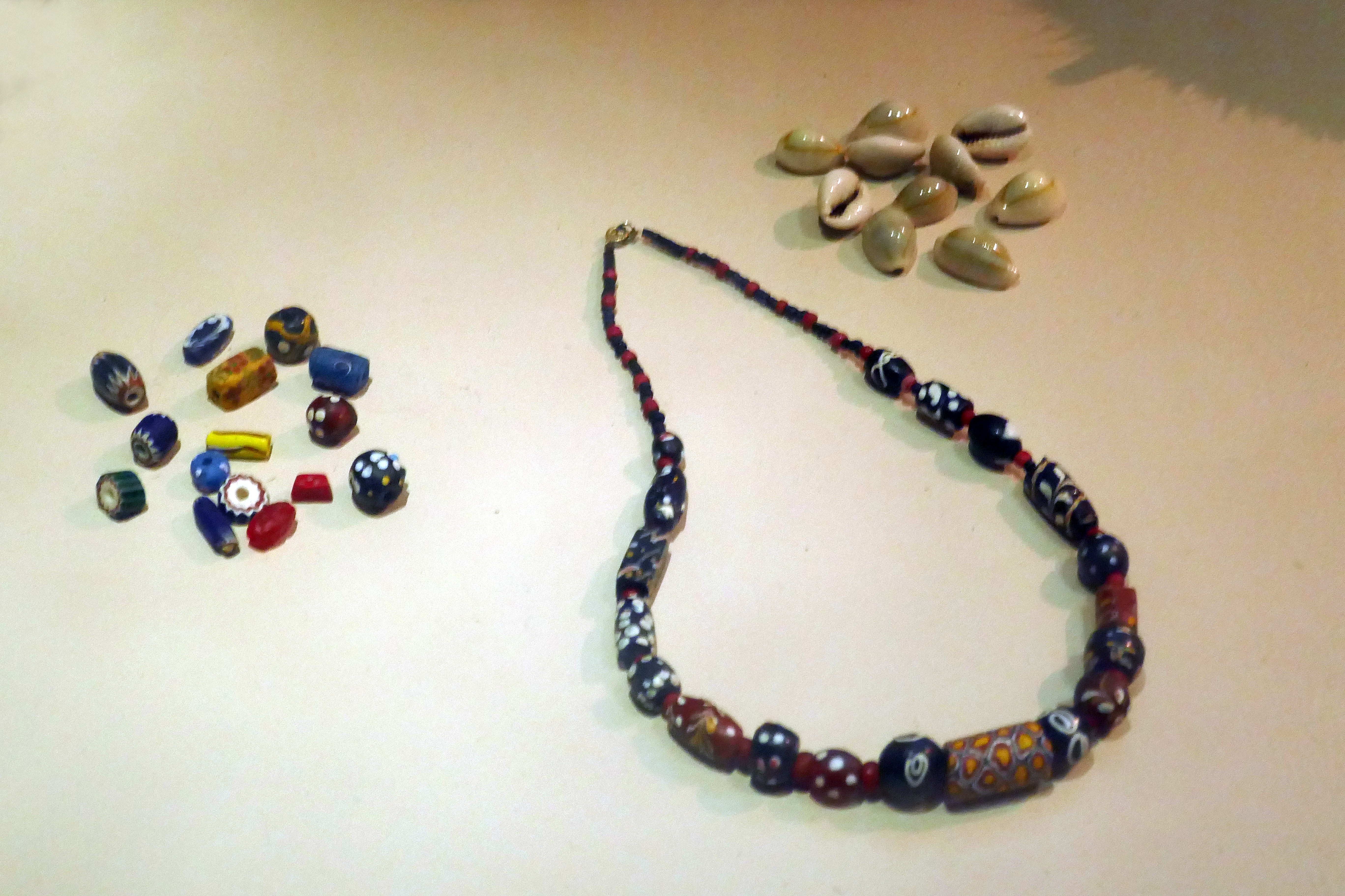 Cauris des îles Marquises et perles de Murano présents sur des objets de parure du 19e siècle. Utilisés comme monnaie en Afrique, les cauris et les perles étaient notamment échangés contre des esclaves. Musée d'Aquitaine, Bordeaux. Collection particulière en dépôt.